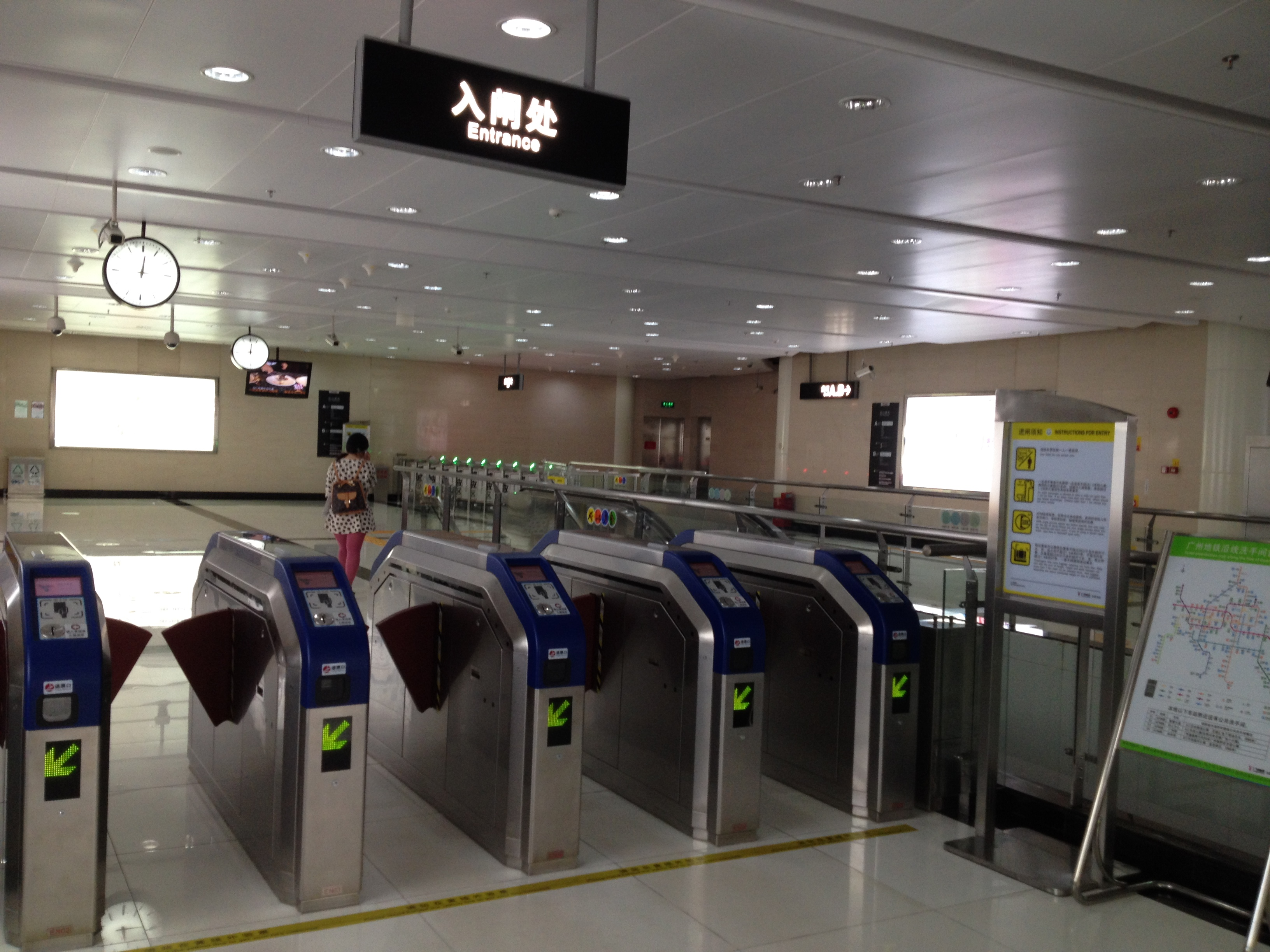 广州地铁妇儿中心站大堂